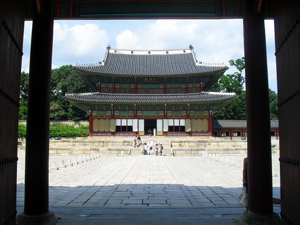 인정문에서 촬영한 창덕궁 인정전